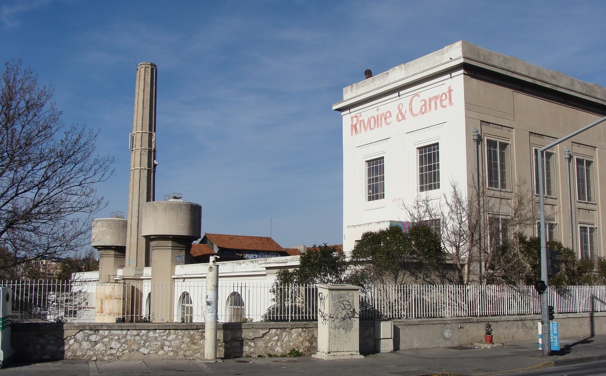 L'ancienne usine Rivoire-et-Carret de la Valbarelle (Marseille, 11e arr.), aujourd'hui fermée.